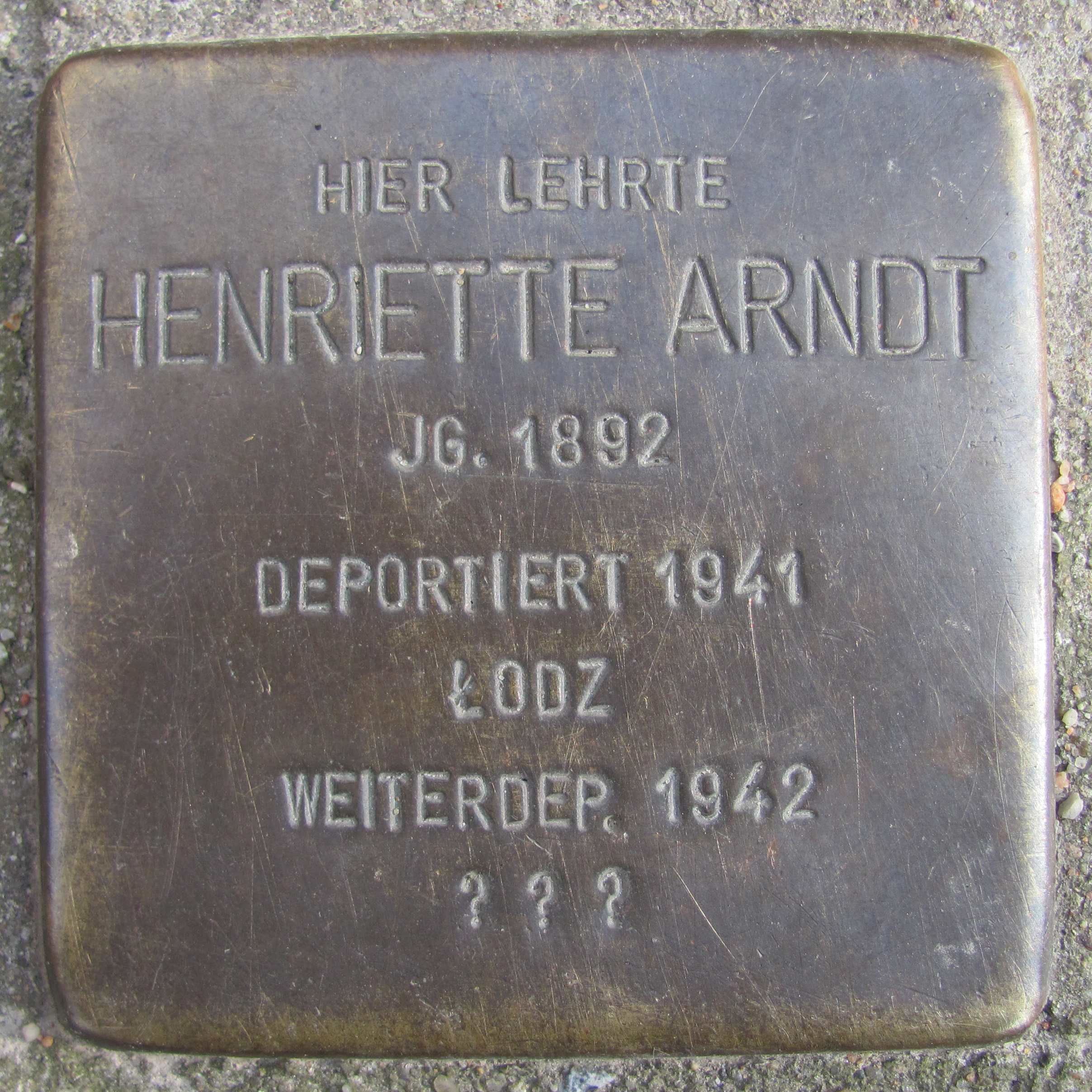 Stolperstein für Henriette Arndt vor dem Haus Alter Teichweg 200